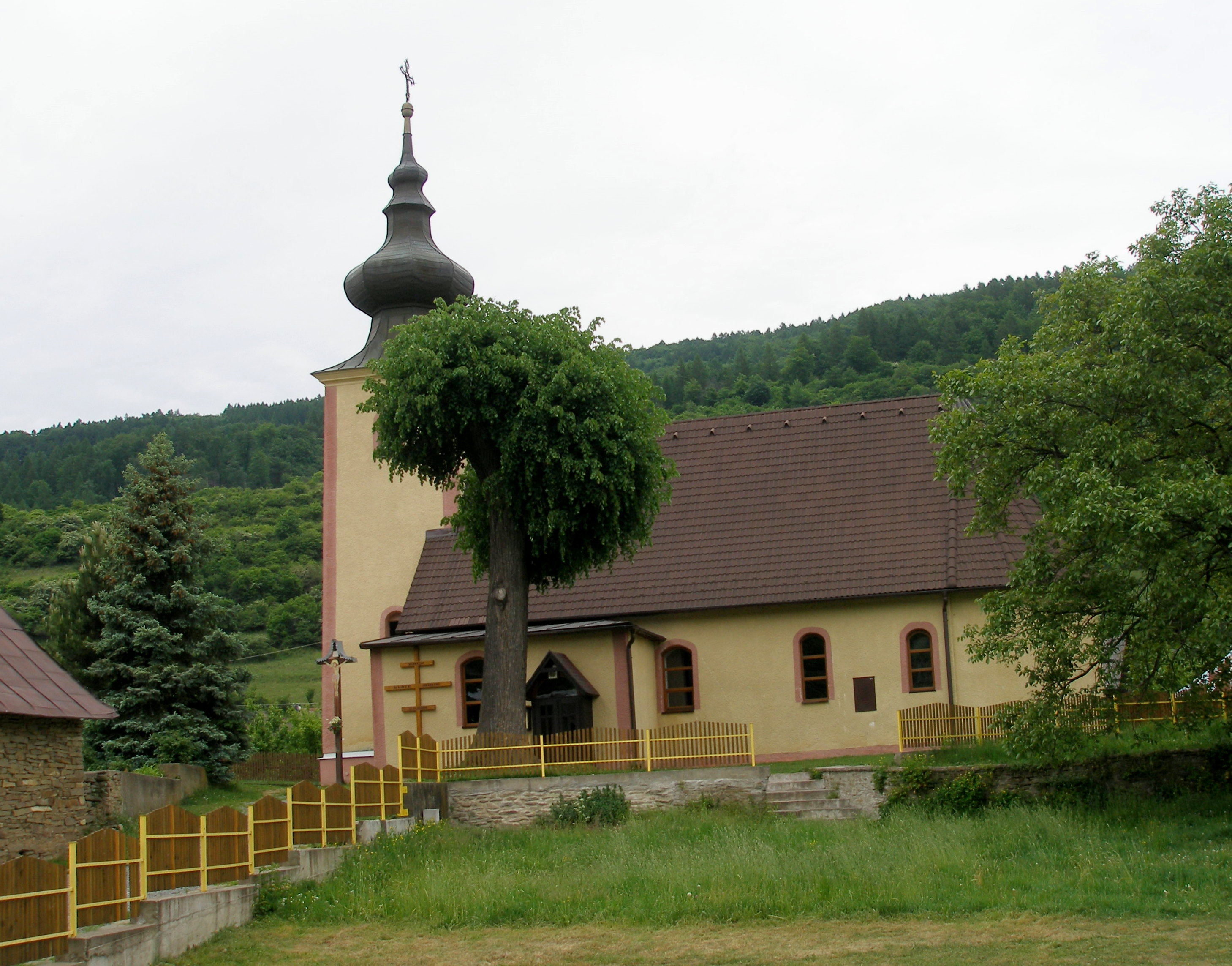 Obec Tichý Potok okres Sabinov.